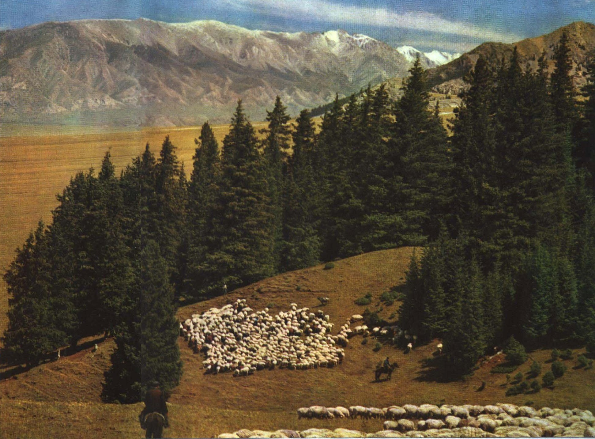 1964-03 1963年 中国新疆伊犁